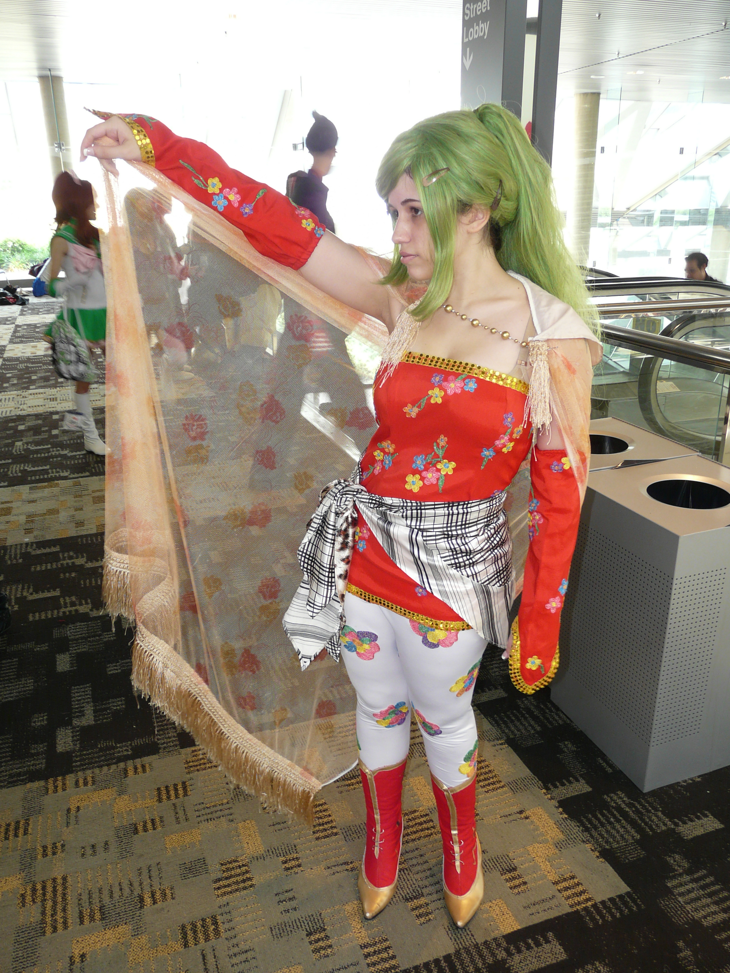 Otakon 2012 cosplay